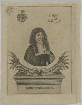 Porträt des Juristen und hann. Ministers Ludolf Hugo (1632-1704)